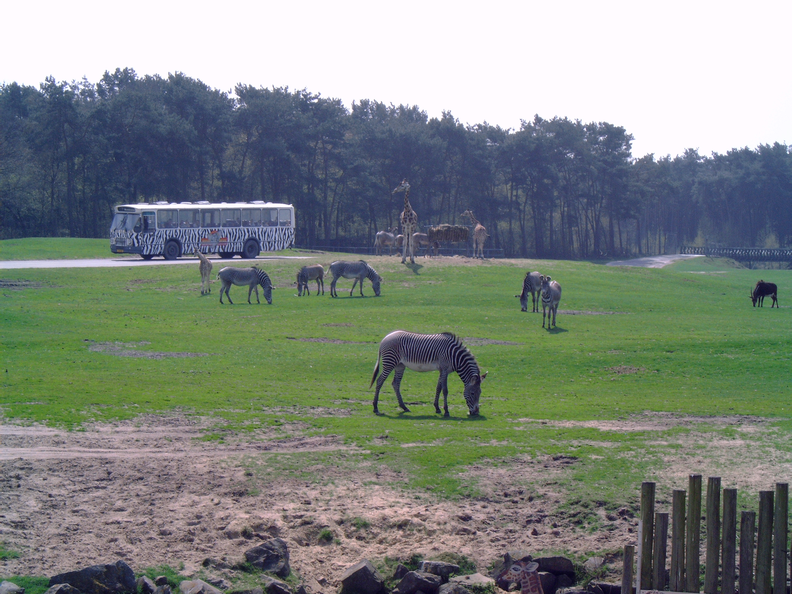 Sphere impression safari park Beekse Bergen